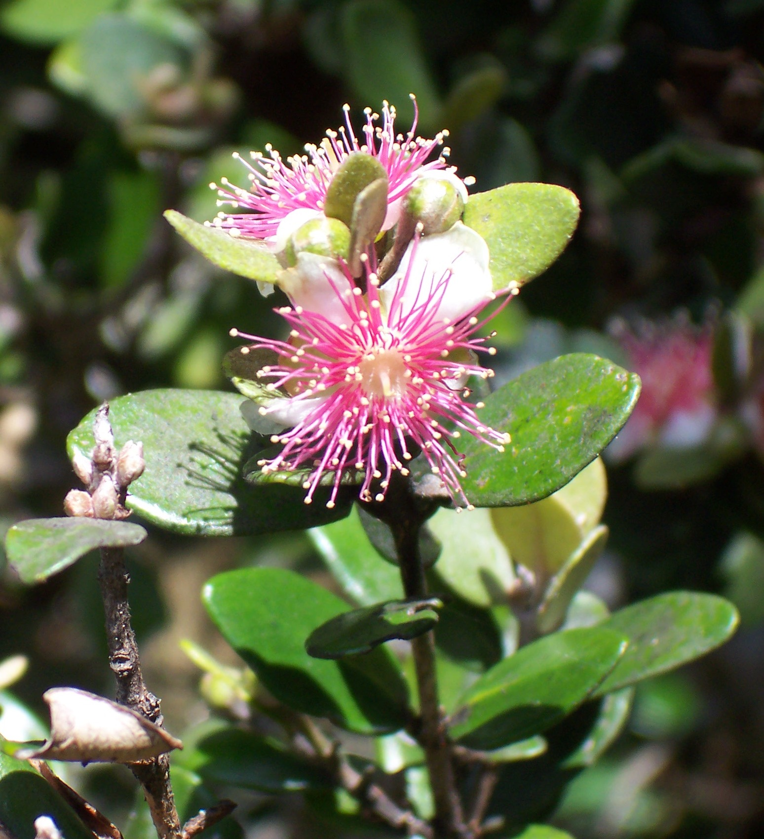 Fleur de bois de nèfles à petites feuilles (Eugenia buxifolia)Réunion island